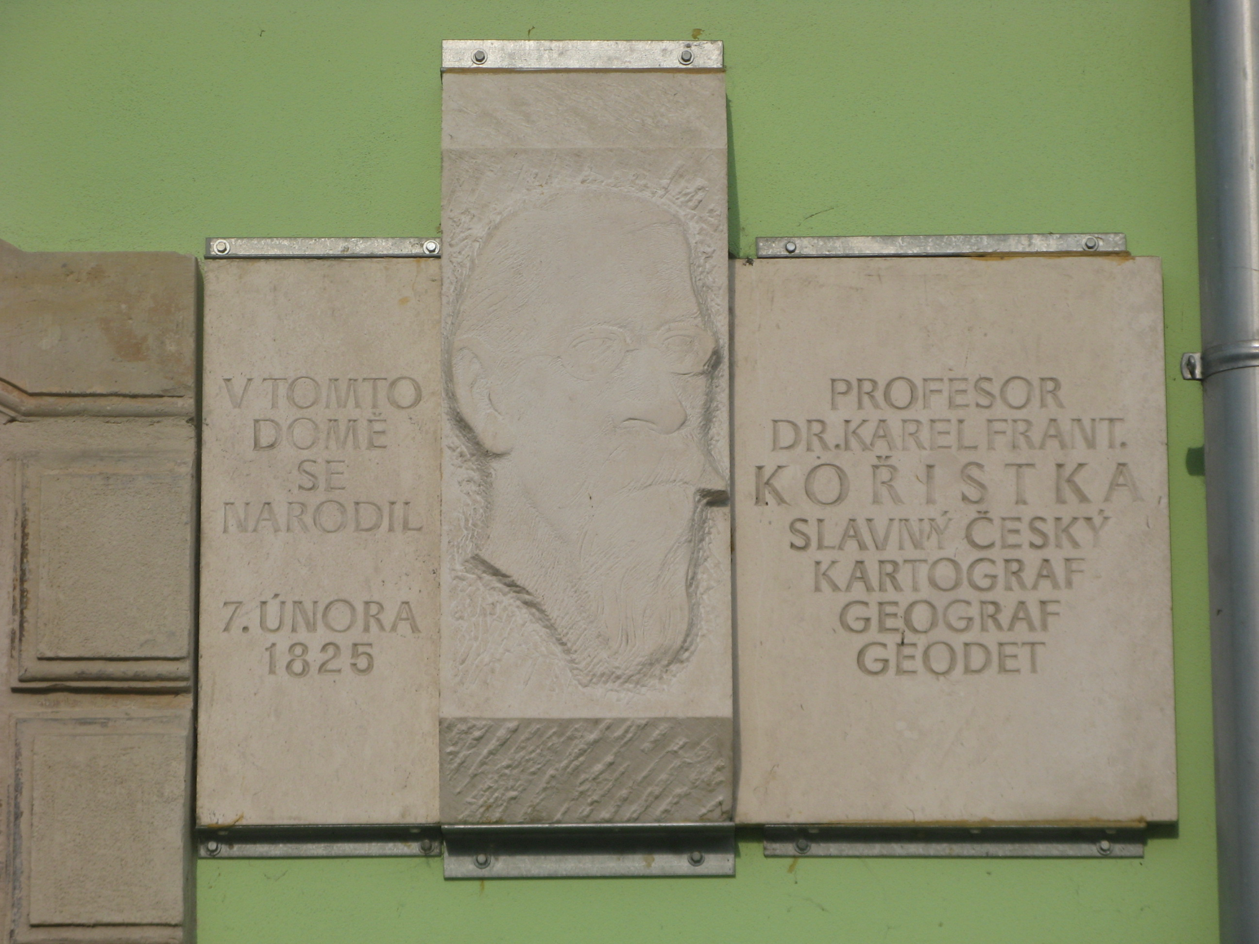 Karel František Kořistka, plaketa na rodném domě, Moravské náměstí č. 71, Březová nad Svitavou